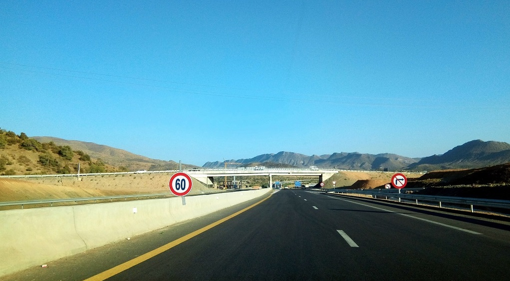 sortie de l'autoroute de Béjaia au niveau de la gare de péage d'Ahnif